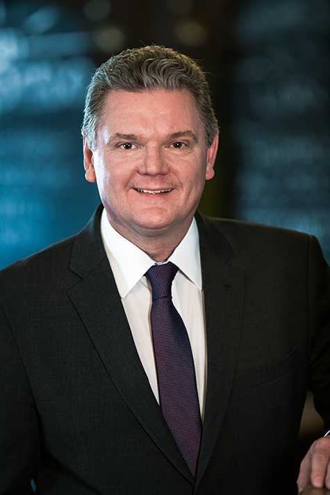 Porträt Stefan Klett, Präsident des Landessportbundes NRW